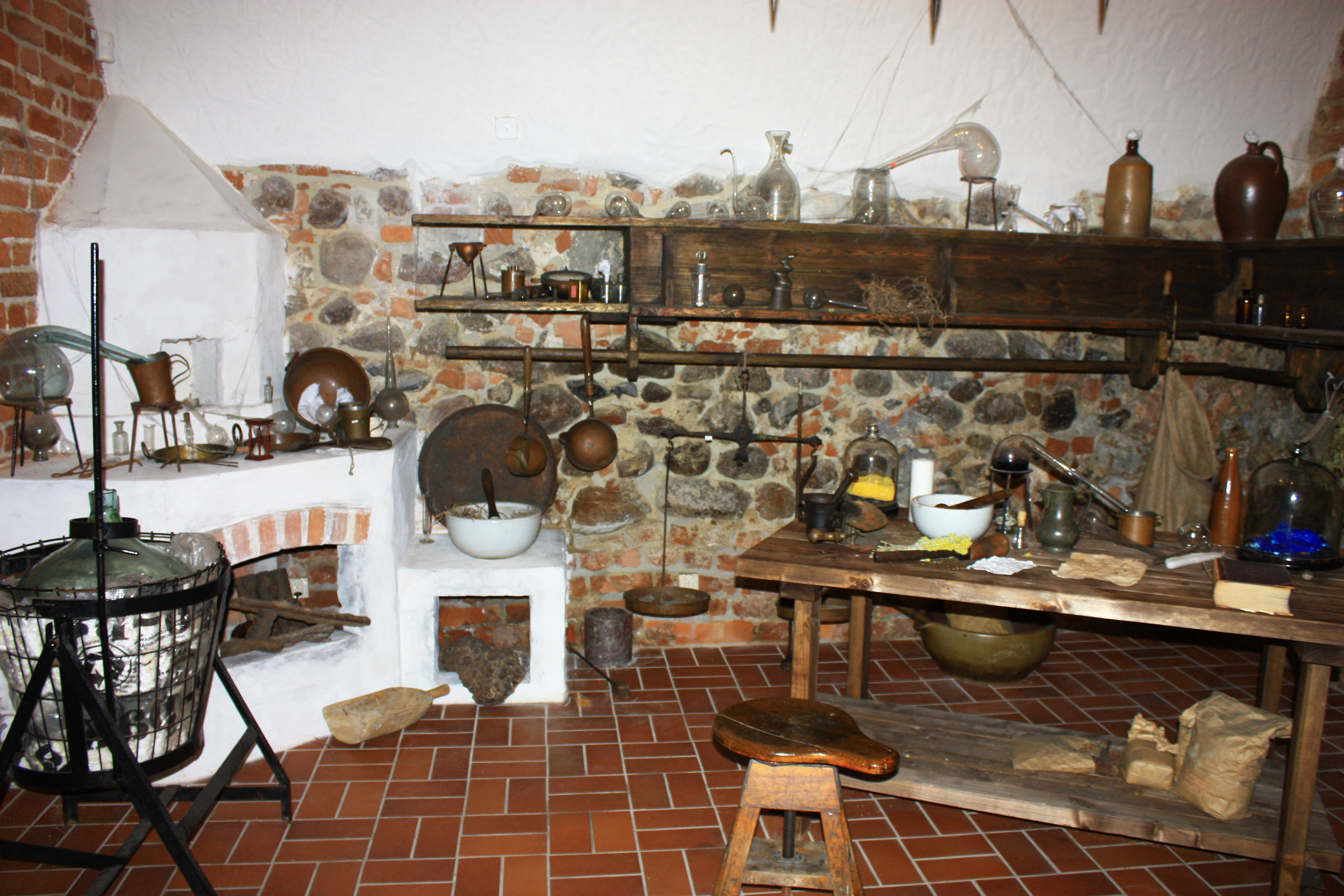 Wrocław, kamienica, XVI